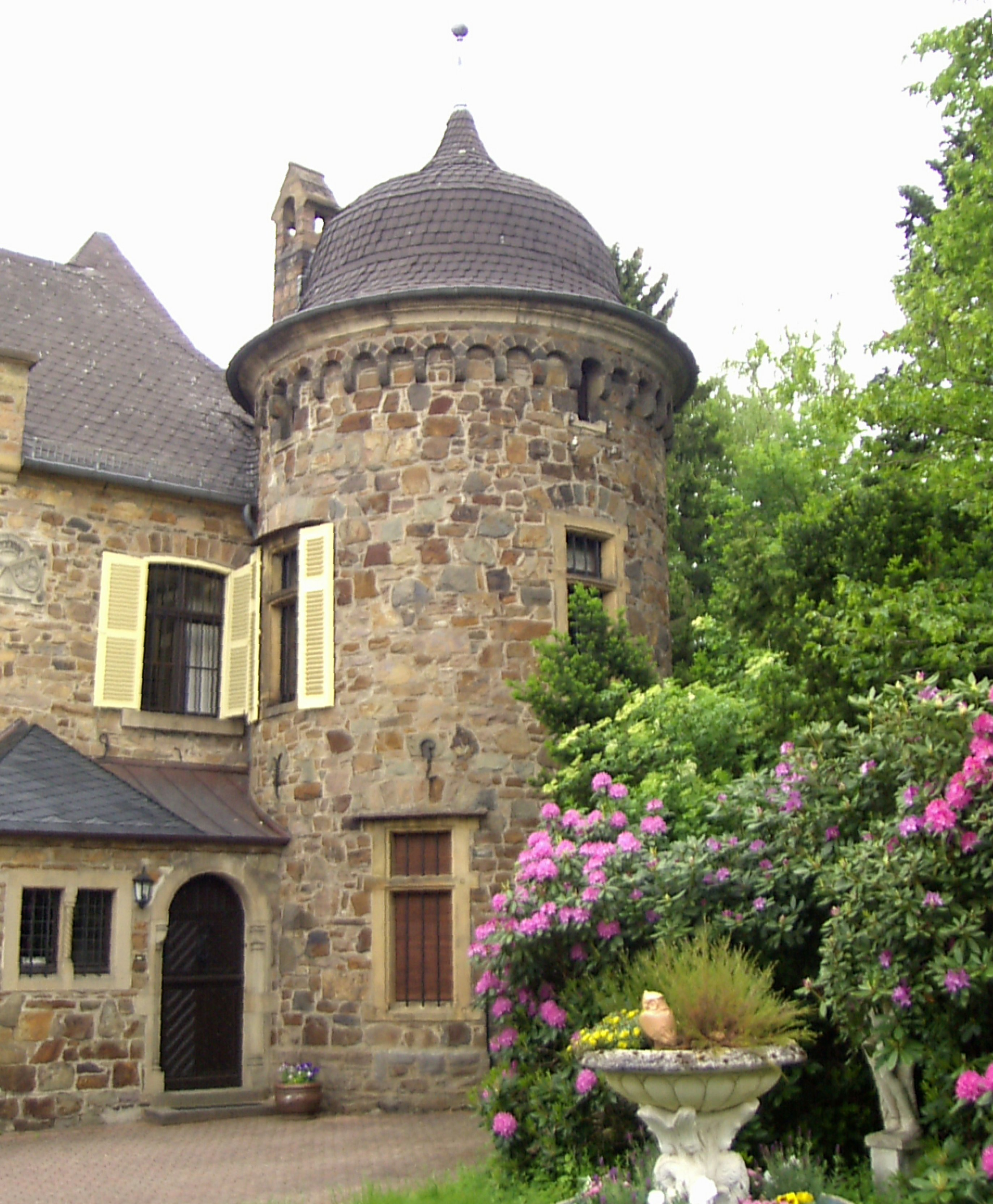 Burg Dattenfeld, Gemeinde Windeck, Nordrhein-Westfalen, Deutschland